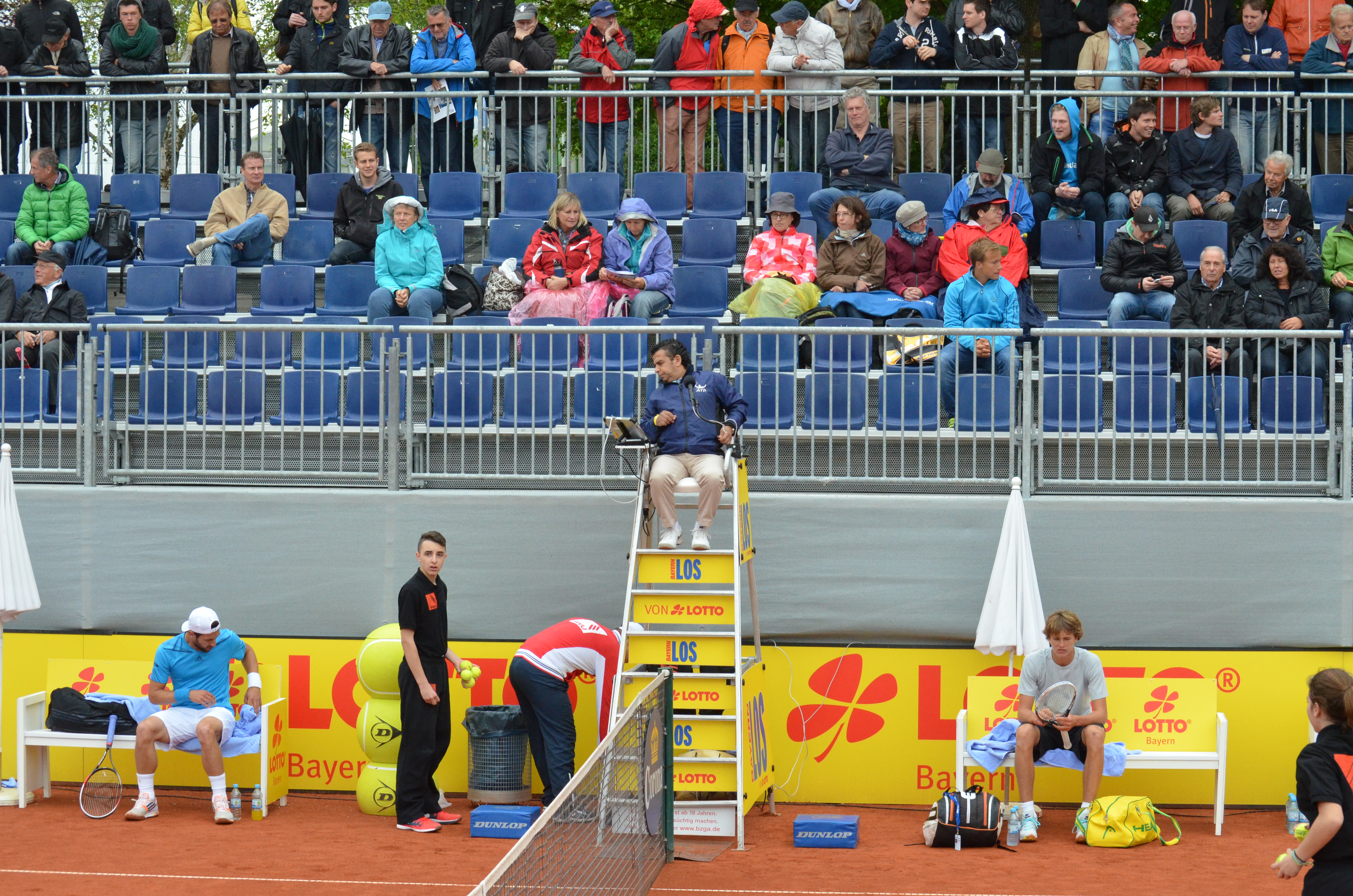 Jürgen Melzer und Alexander Zverev beim Seitenwechsel während der Erstrundenbegegnung bei den BMW Open 2014